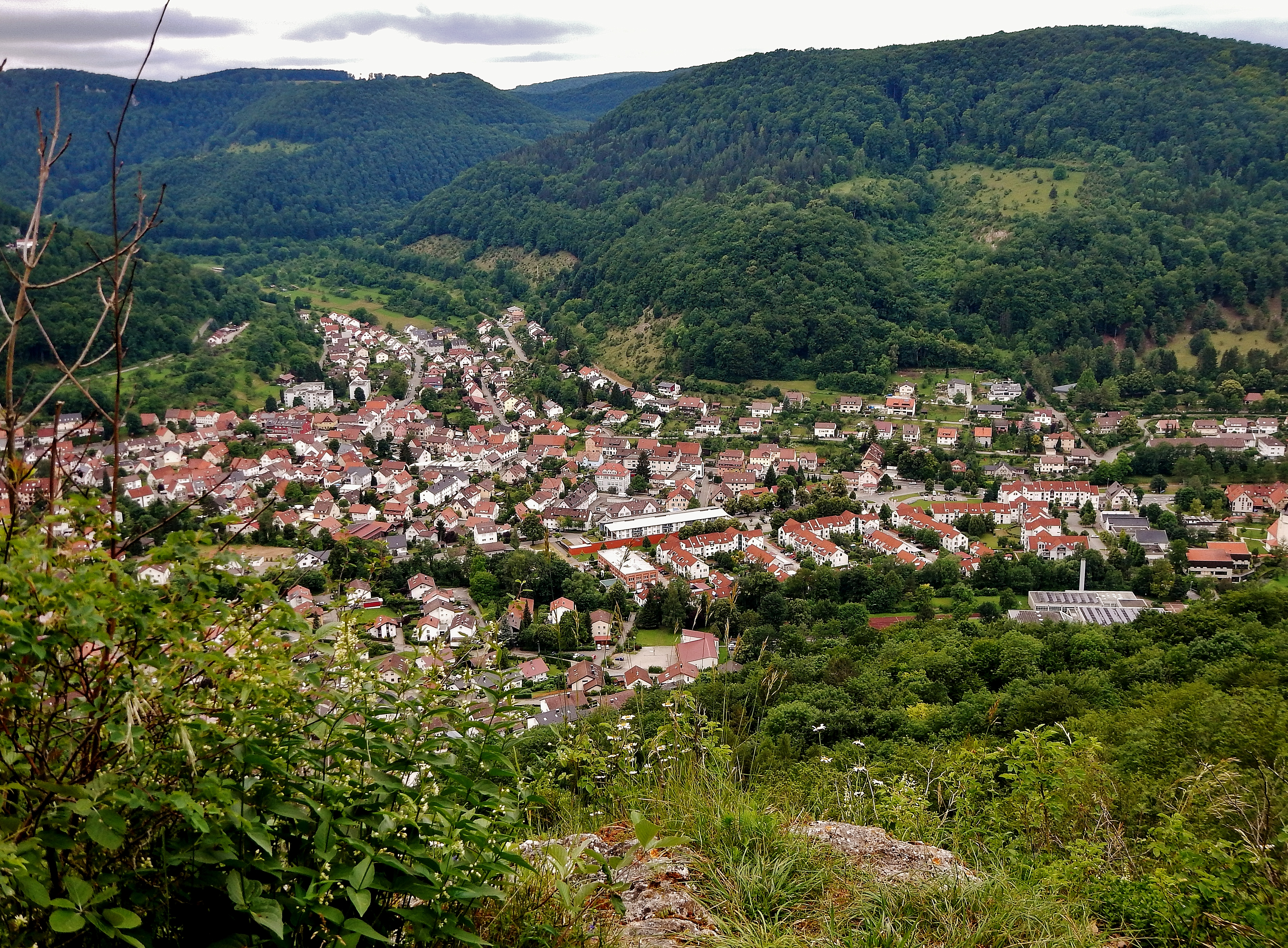 Ausblick vom Burgstein, 744 m. ü. NN - Schwäbische-Alb-Nordrand-Weg (Hauptwanderweg 1, HW 1), Albsteig: Blick auf Lichtenstein.